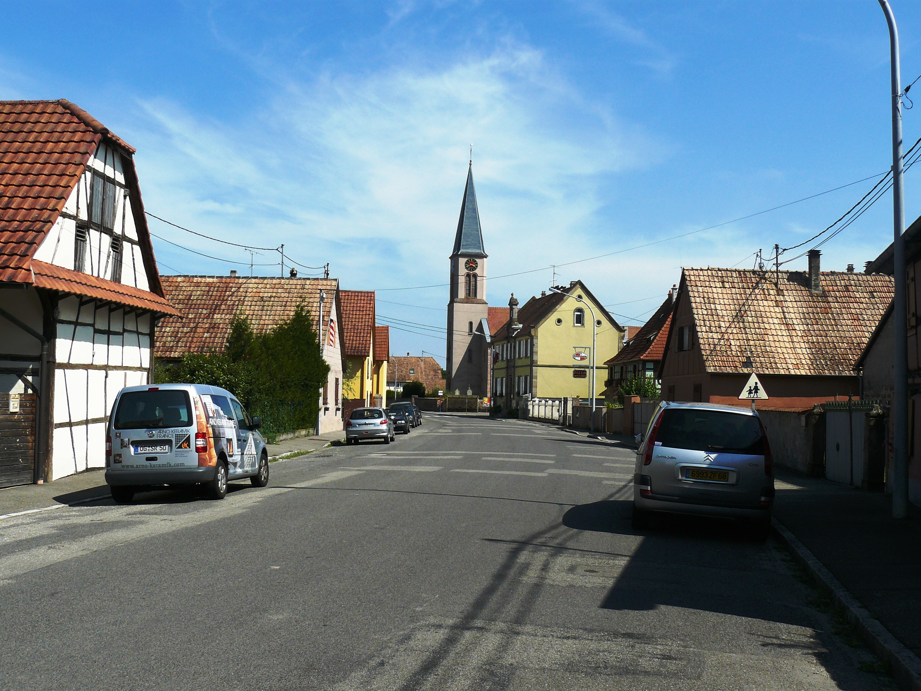 Le village de Heidolsheim et son église